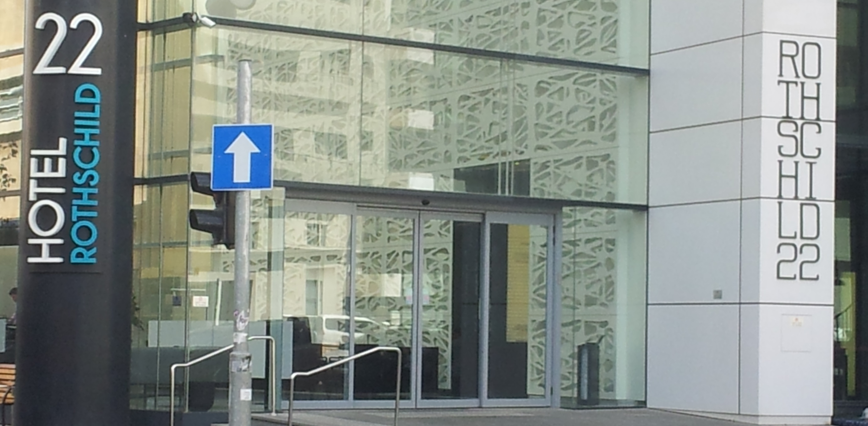 הכניסה למגדל רוטשיל 22 ת"א